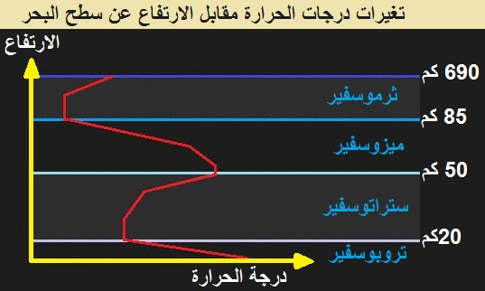 رسم يبين تغيرات درجة الحرارة في طبقات الغلاف الجوي للكرة الأرضية مقابل الارتفاع عن سطح البحر. Earth Atmosphere Temperature profile in different layers against height.